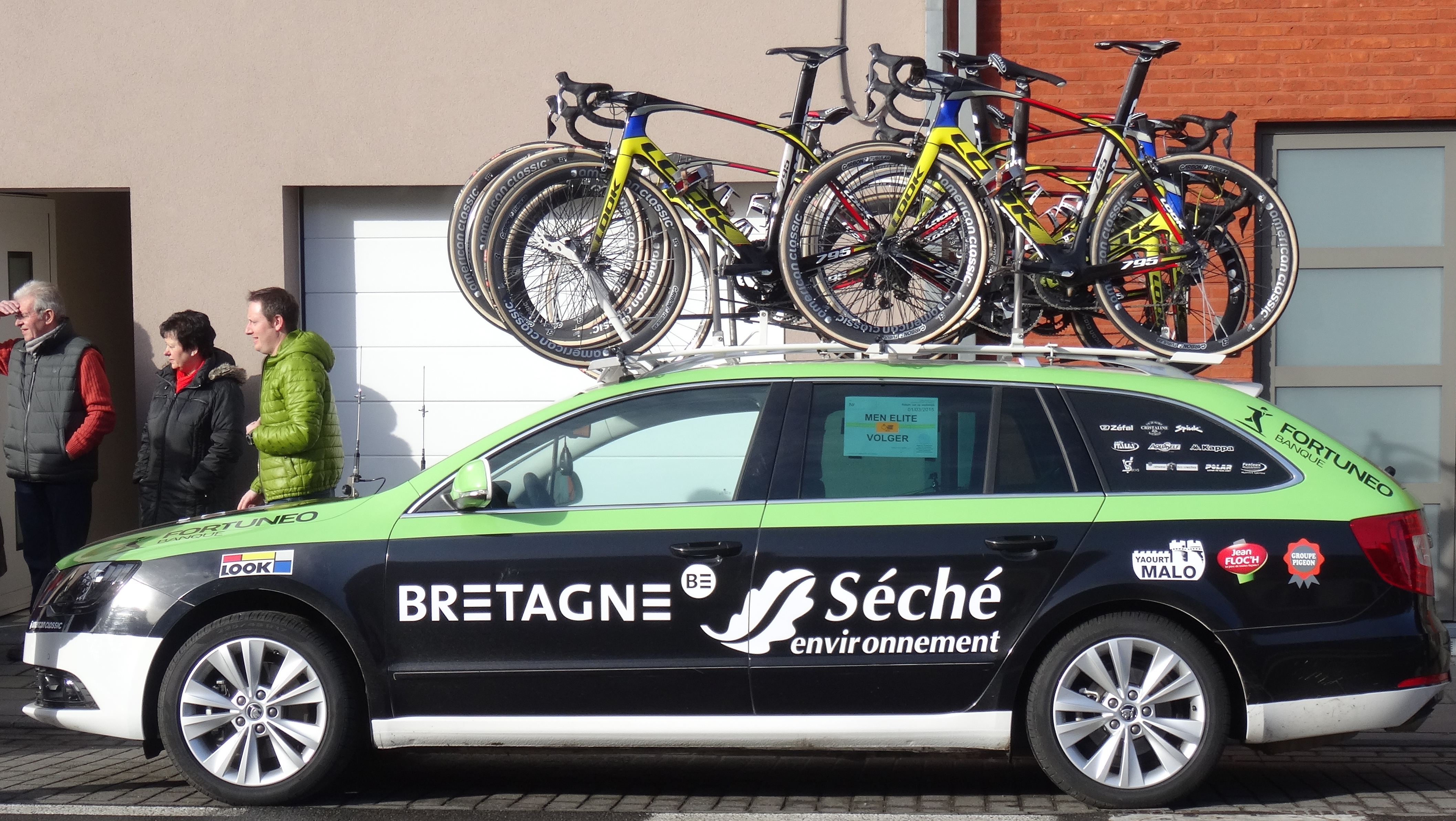 Reportage réalisé le dimanche 1er mars à l'occasion du départ et de l'arrivée de Kuurne-Bruxelles-Kuurne 2015 à Kuurne, Belgique.